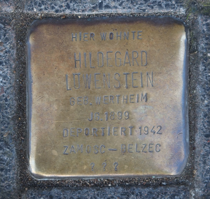 Stolperstein in Soest Jakobistraße 19, Hildegard Löwenstein